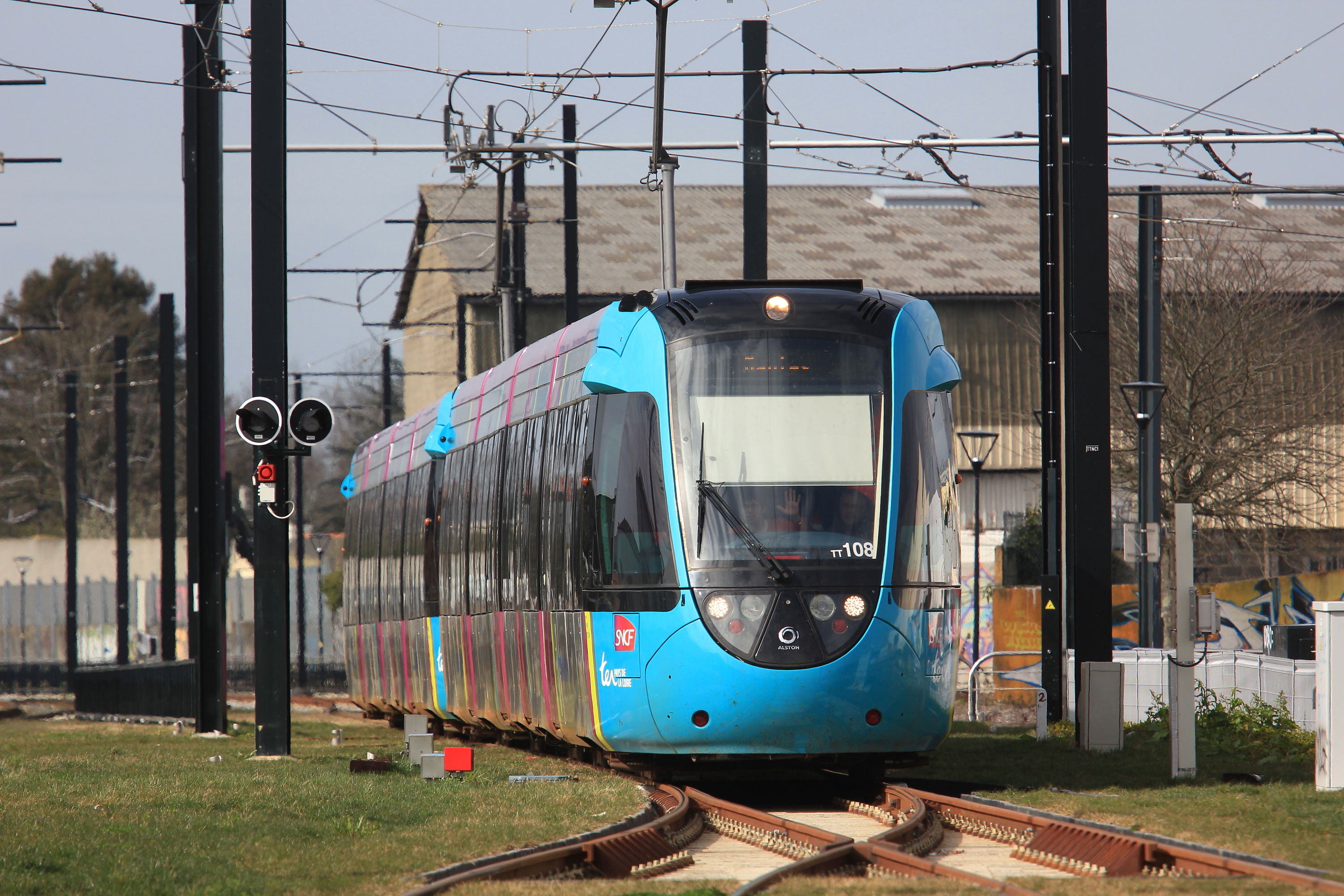 Les rames de tram-train Citadis Dualis n°108 et 111 entrent en gare de Haluchères - Batignolles au train TER n°859625, en provenance de Châteaubriant, lors de l'inauguration de la ligne. Elles franchissent le croisement à niveau avec la ligne du tramway nantais.